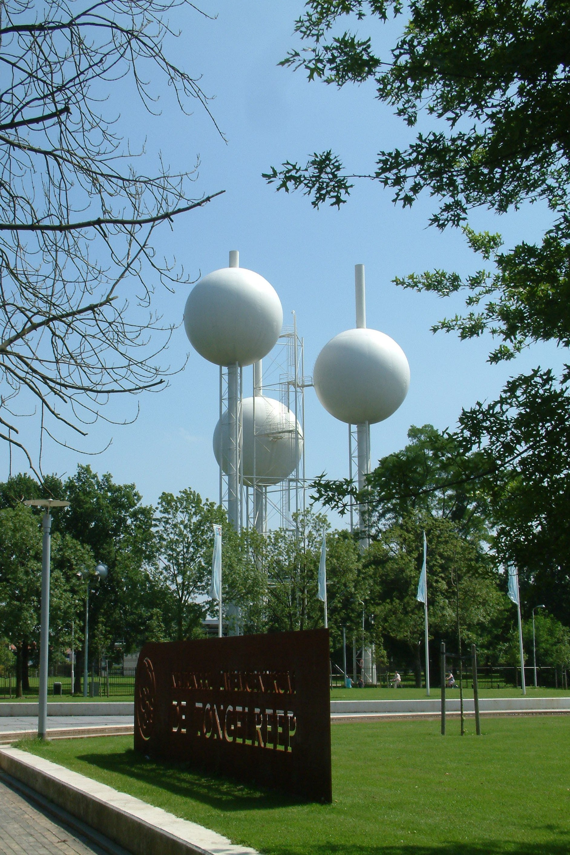 De waterbollen (watertoren) van Eindhoven (NL). Ontworpen in 1970 door Wim Quist.